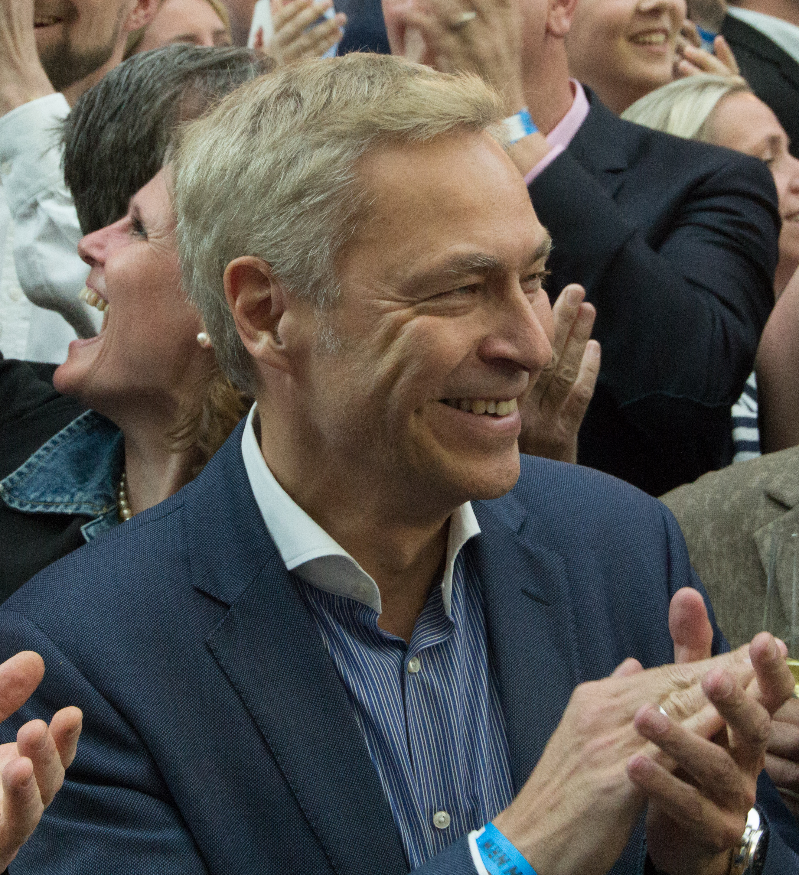 Andreas Reichel (FDP) am Wahlabend der NRW Landtagswahl am 14. Mai 2017 in Düsseldorf